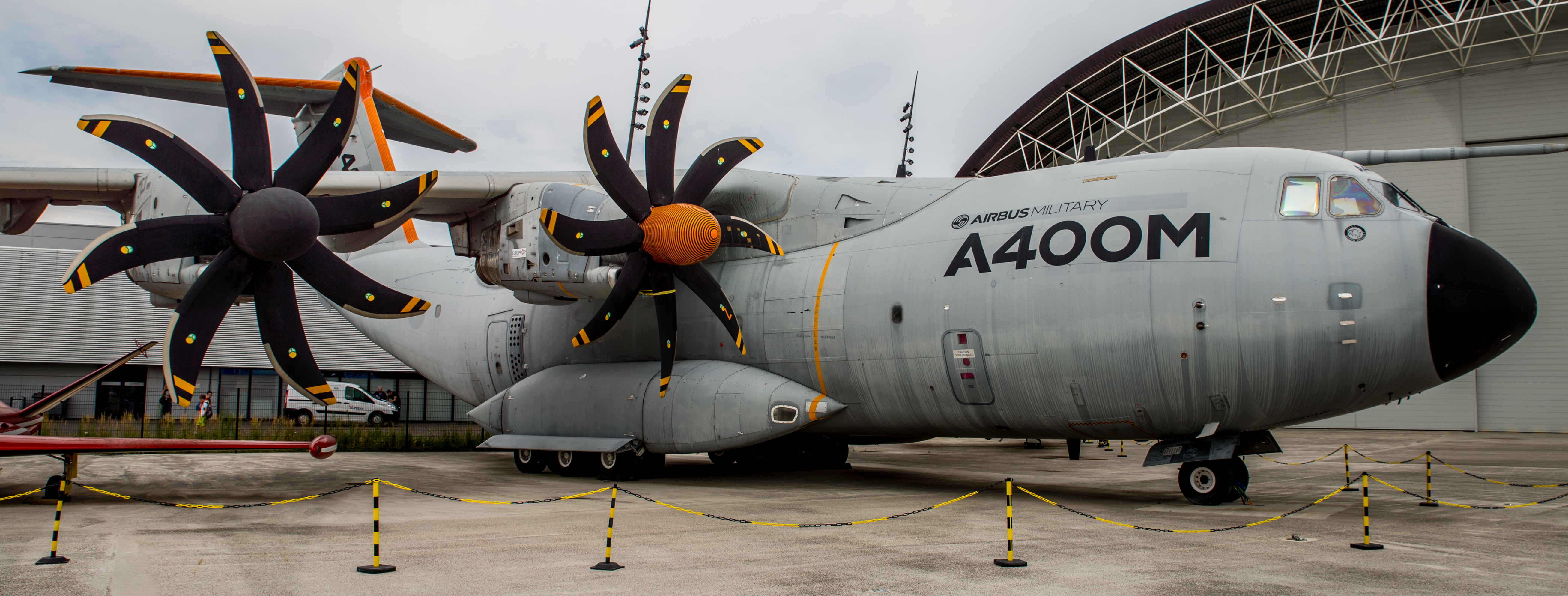 Airbus A400M MSN1